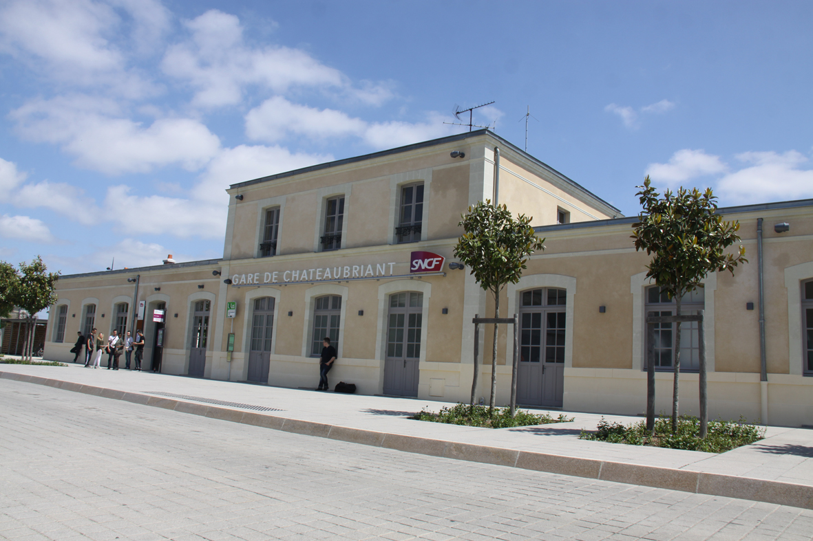 Gare SNCF rénovée